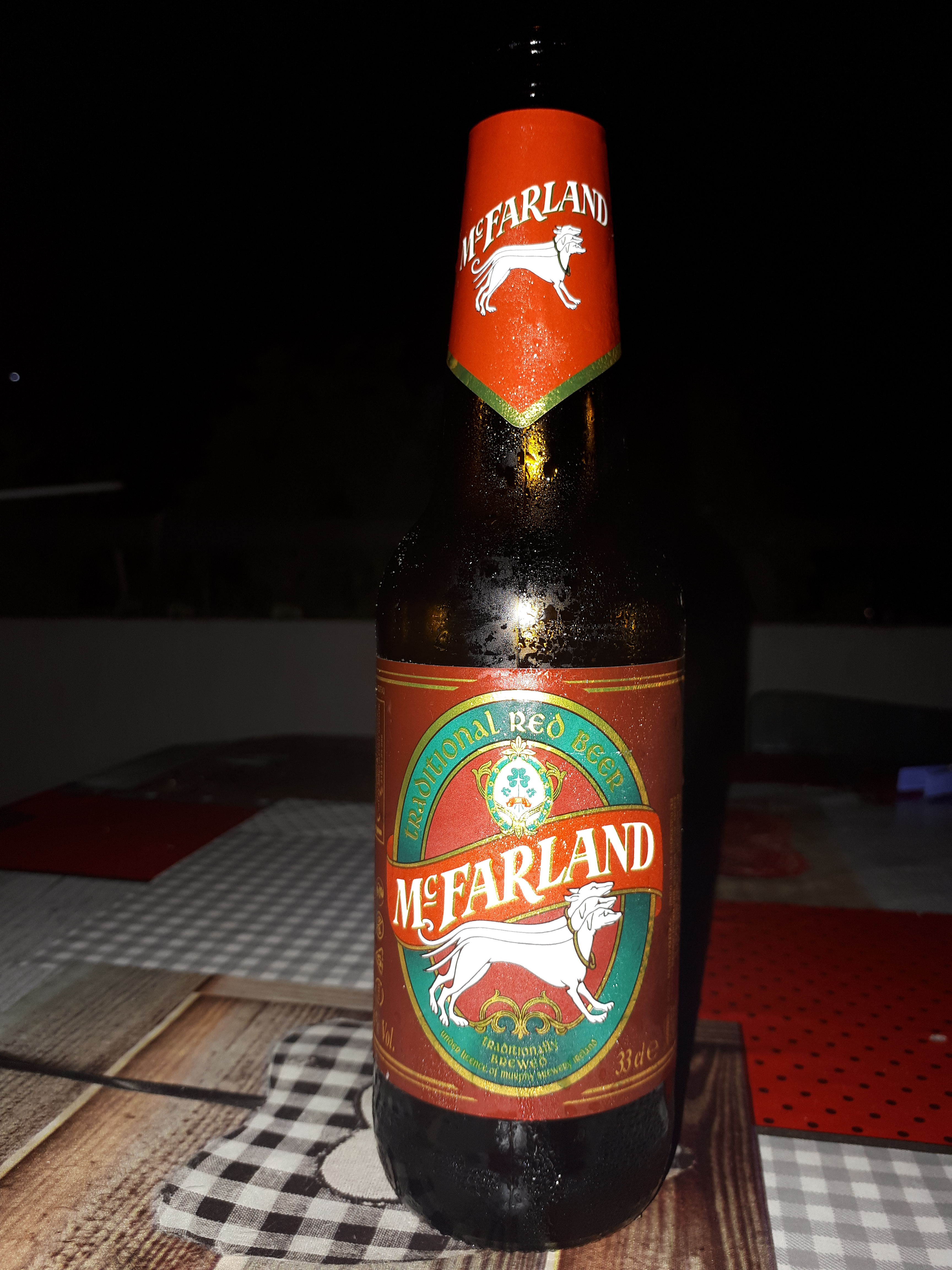 Bottiglia di birra McFarland